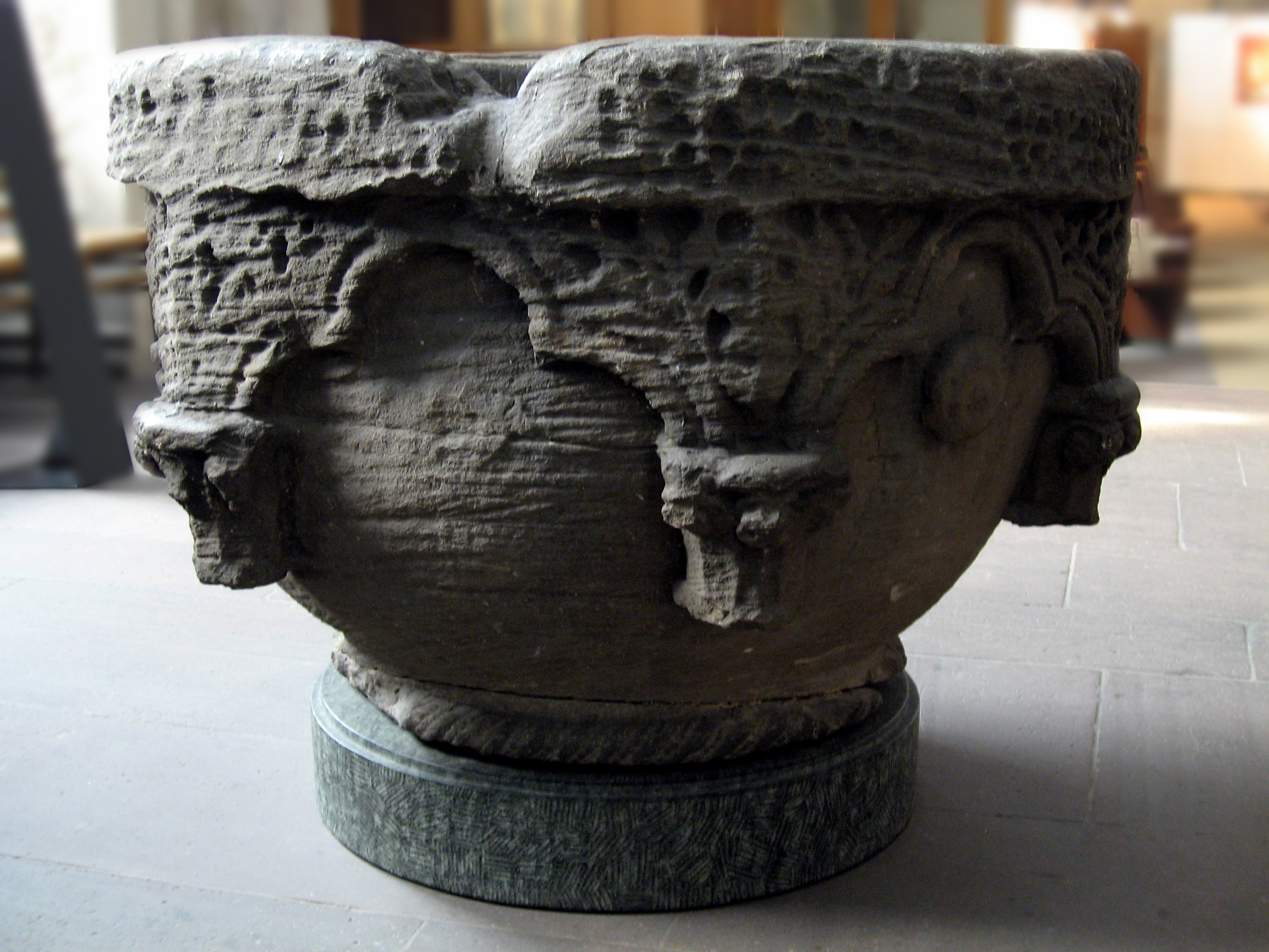 Dortmund, Marienkirche, spätromanischer Taufstein